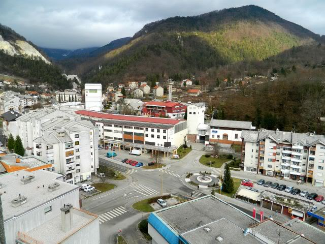 Center Hrastnika